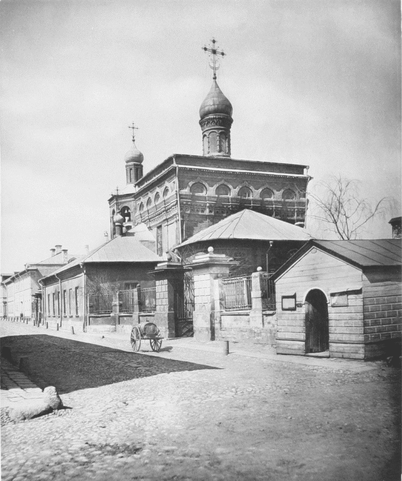 Храм Михаила Архангела в Овчинниках